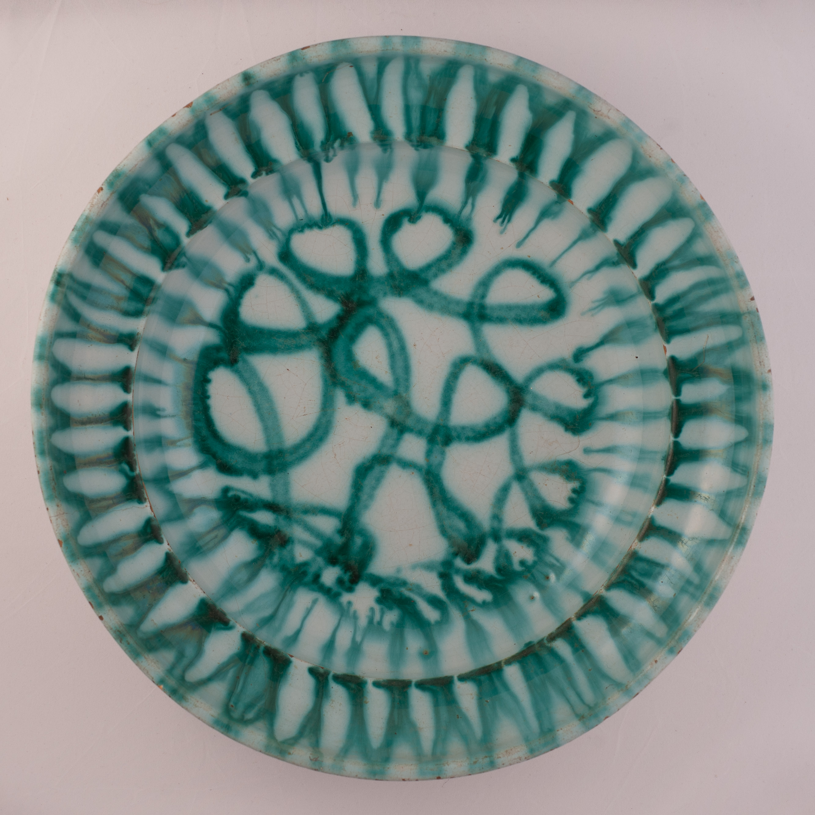 Majolika Sammlung Bad Radkersburg Bowl Gmunden 1850 Grün geflammt, Kupferoxyd